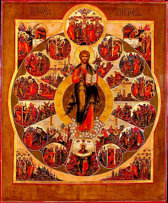 Церковь Христова